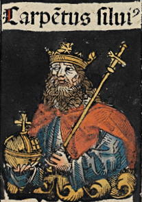 Зображення Капета Сільвія у Нюрнберзькій хрониці.